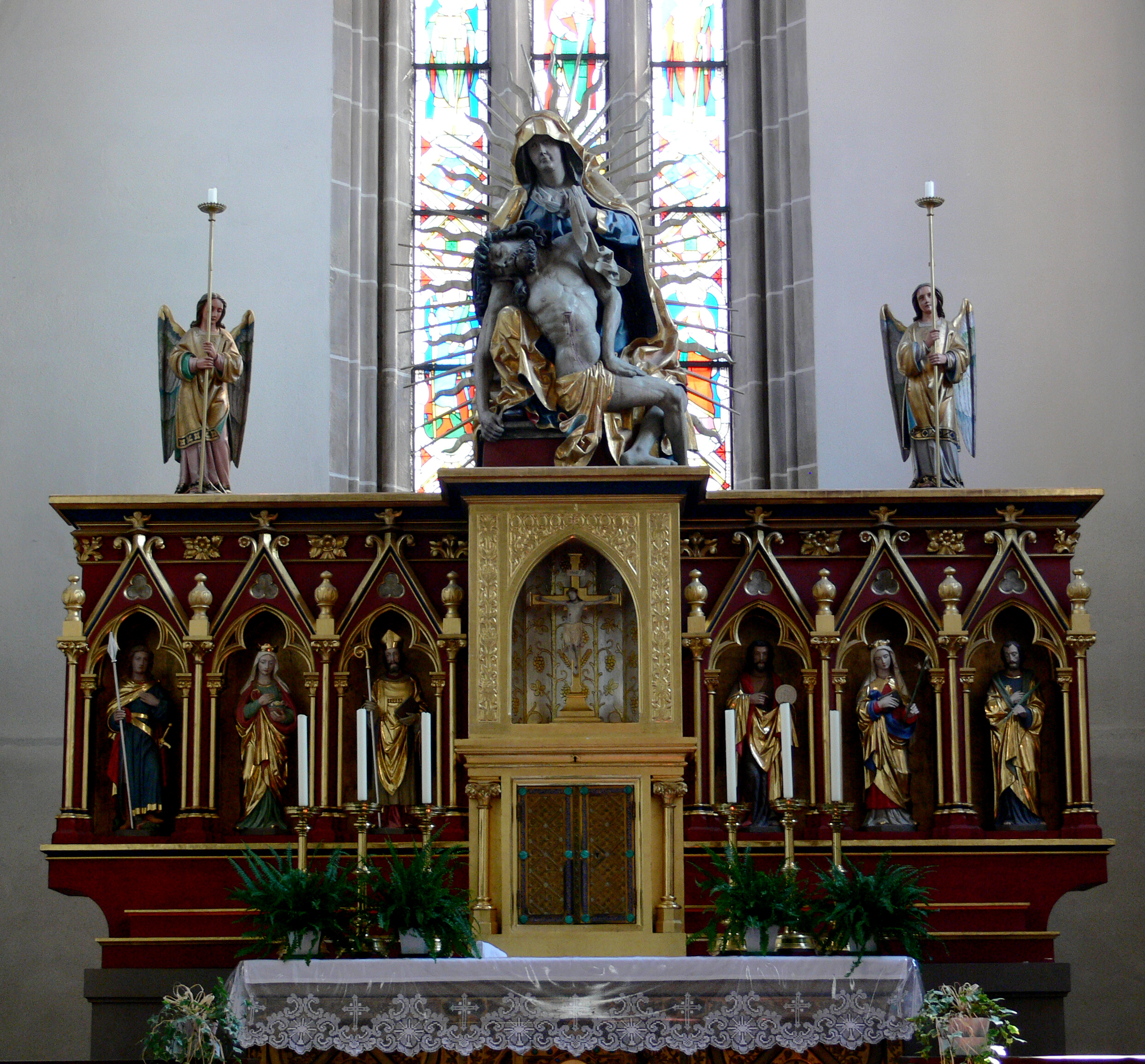 Liebfrauenmünster, Wolframs-Eschenbach, Landkreis Ansbach Hochaltar, 1877 von Georg Schreiner (Regensburg), 1945 verändert; mit Pietà (um 1600)